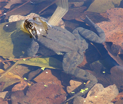 Grasfrosch im Gartenteich. Aufgenommen in Hamburg im März 2005.